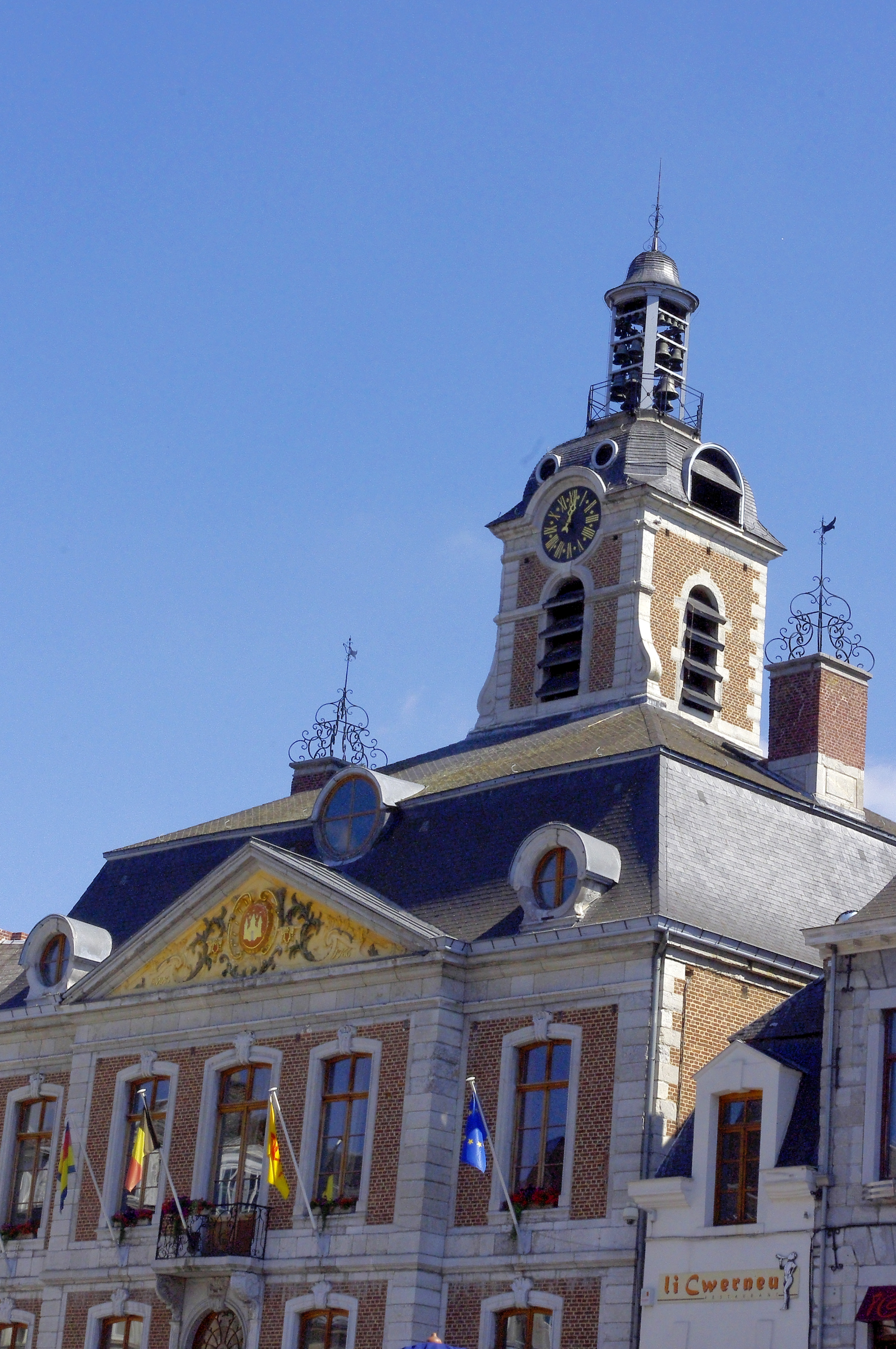 Huy - l'hôtel de ville